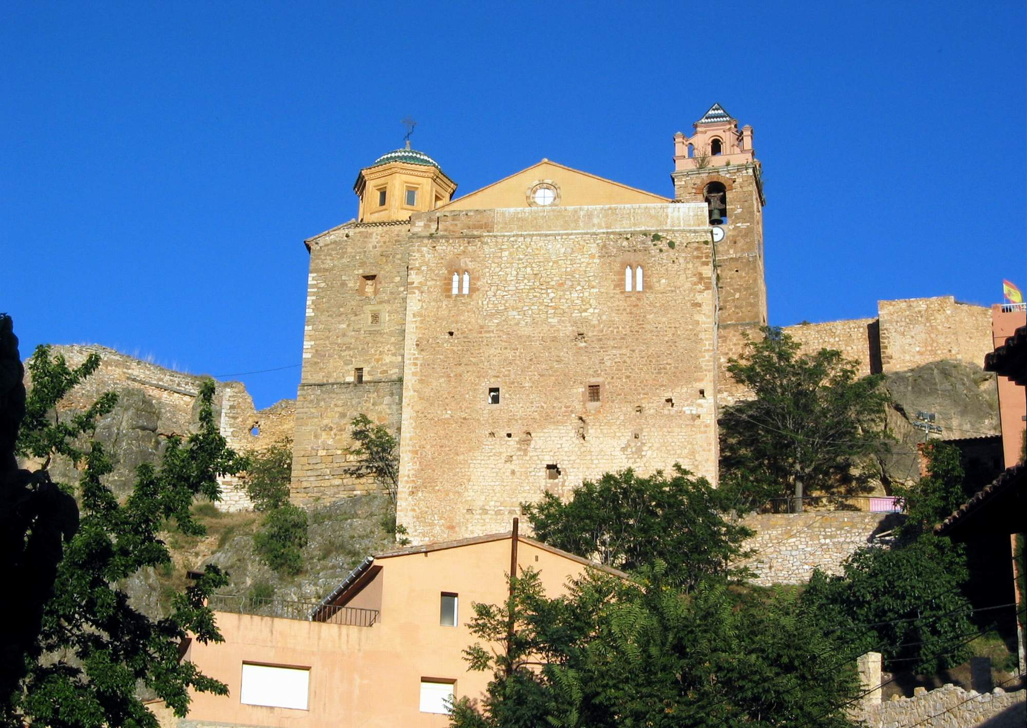 Vista general (occidental) conjunto monumental de Nuestra Señora de los Ángeles (Castielfabib), con el campanario a la espístola y la cúpula de la capilla de los Espejo al evangelio (2013).